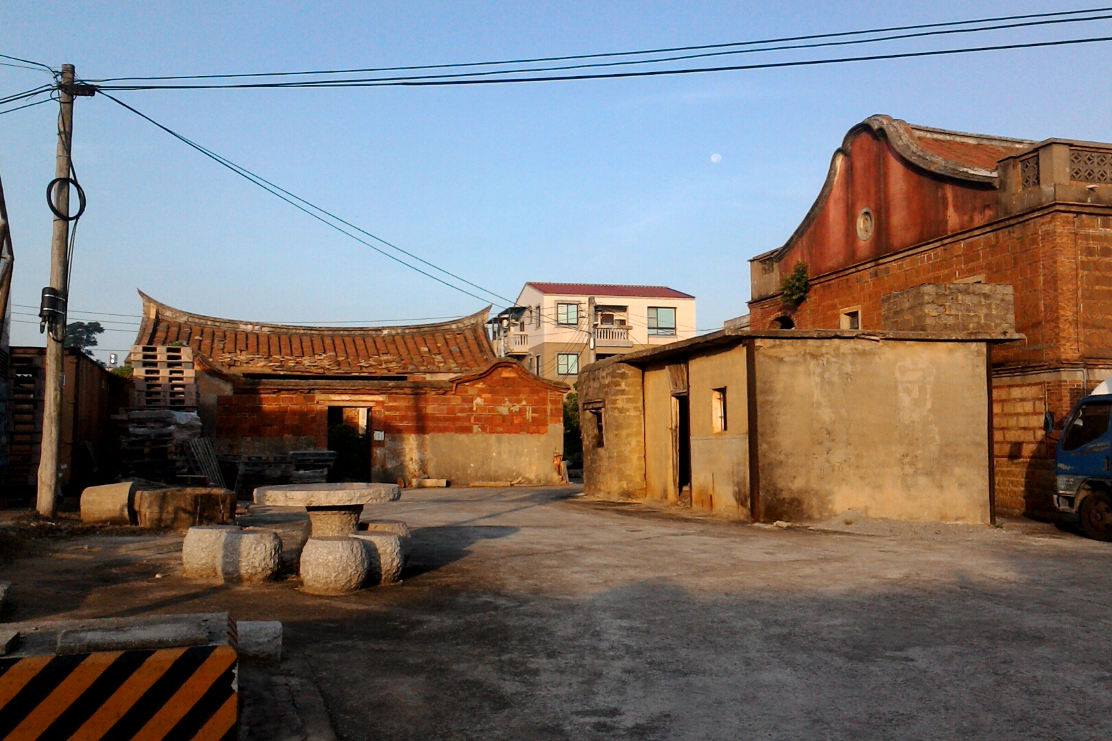 金寧鄉下堡聚落,福建省金門縣金寧鄉盤山村